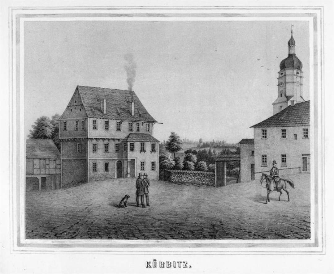 Kürbitz (Vogtland), in einer Ansicht von 1859